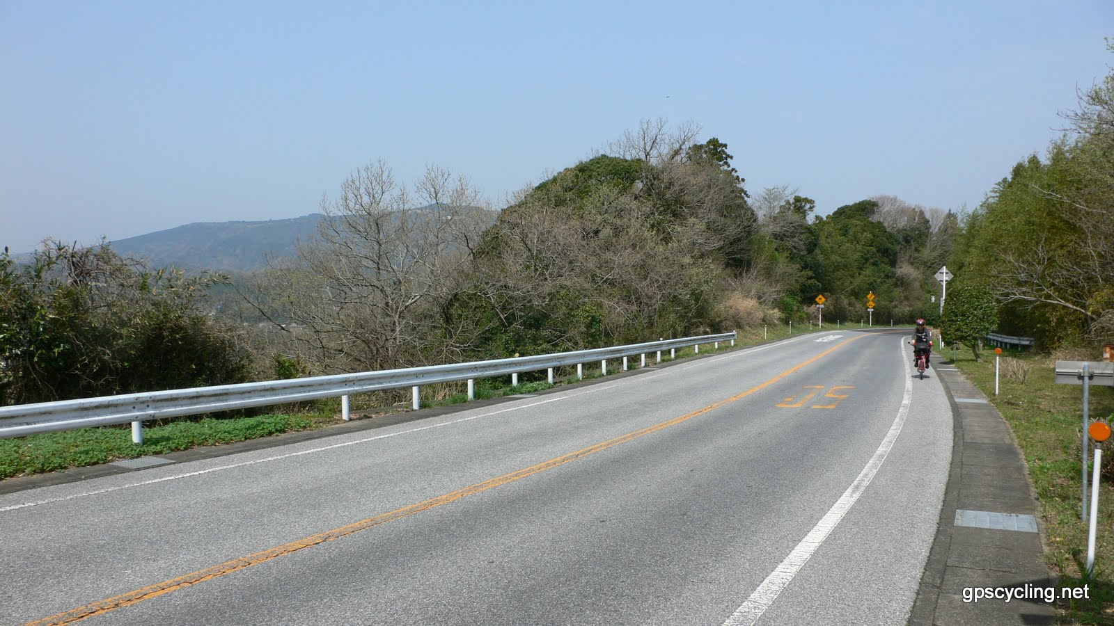 房総スカイライン